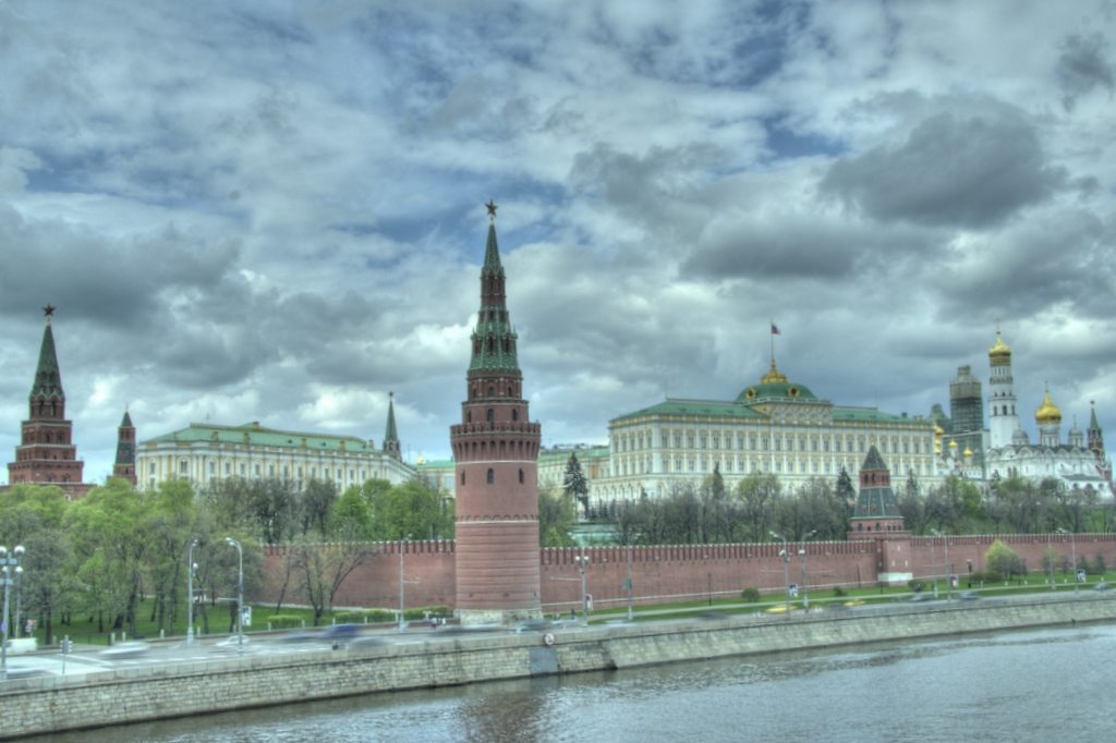 Вид на кремль с Большого Каменного Моста. Moscow Kremlin HDR